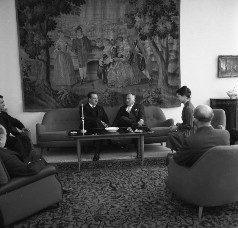 Bundestagspräsident Gerstenmaier empfängt den sizilianischen Parlamentspräsidenten Ferdinando Stagno d'Alcontres